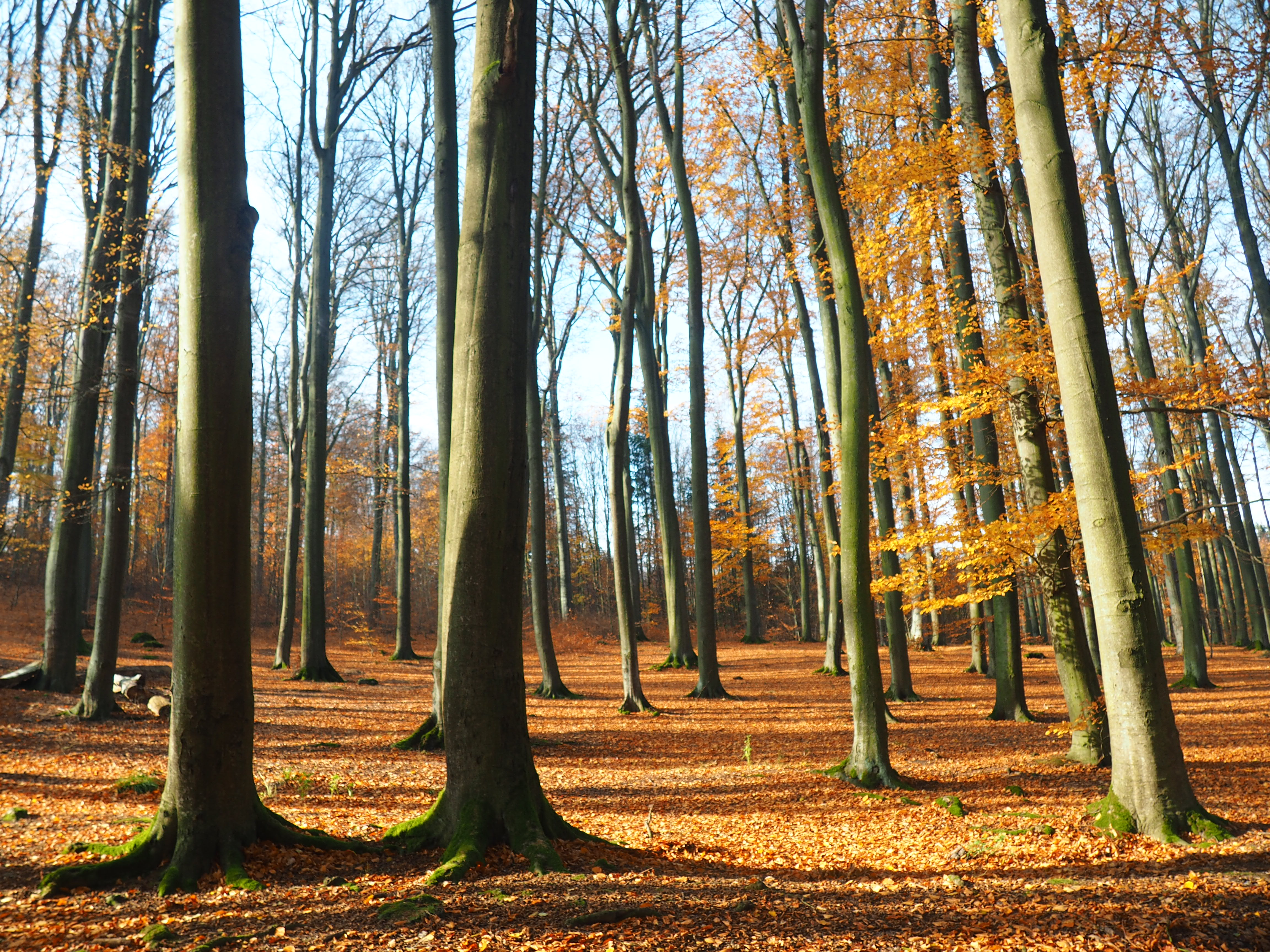 na podzim